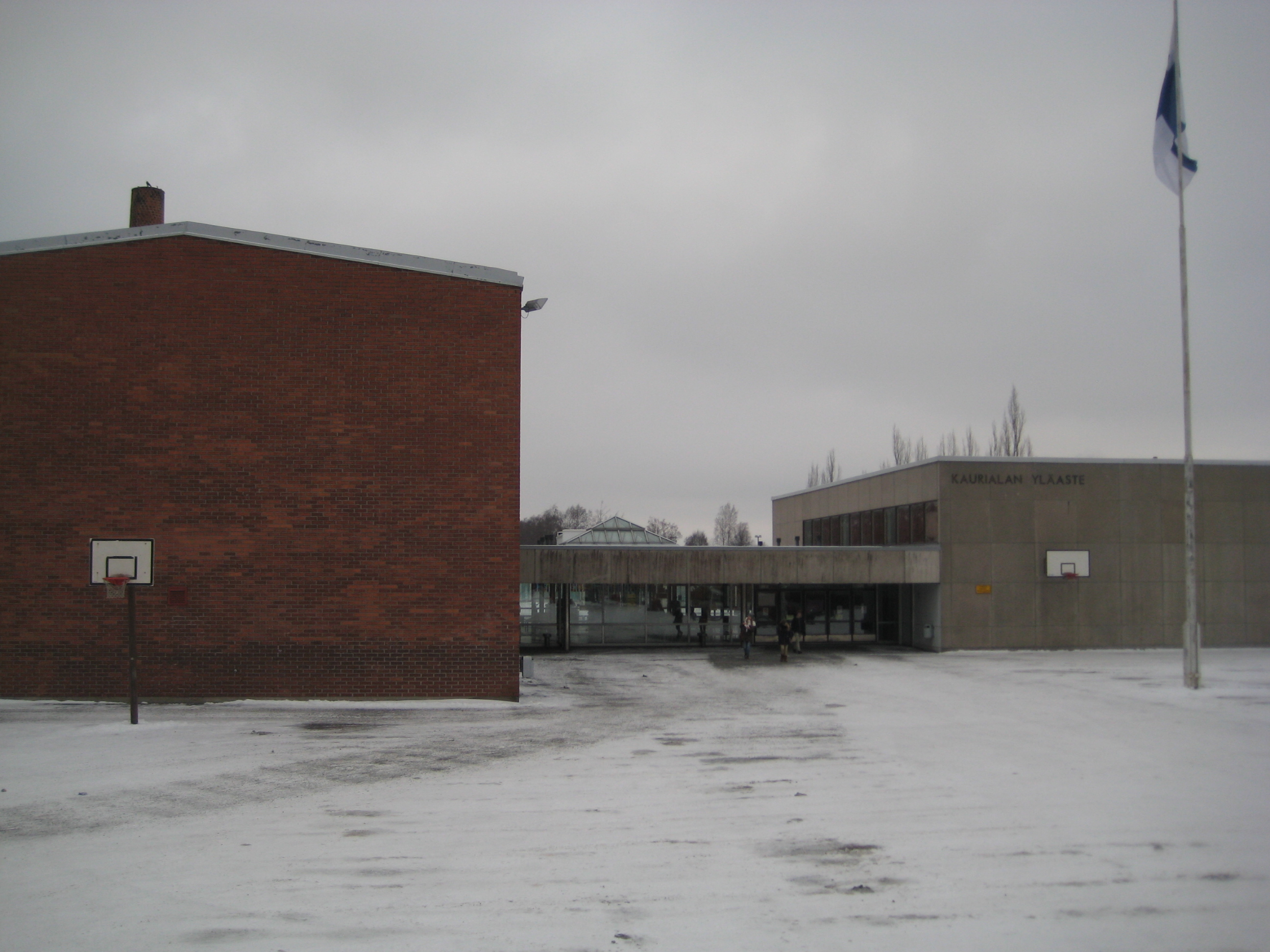 Kaurialan koulun päärakennus ja liikuntasali